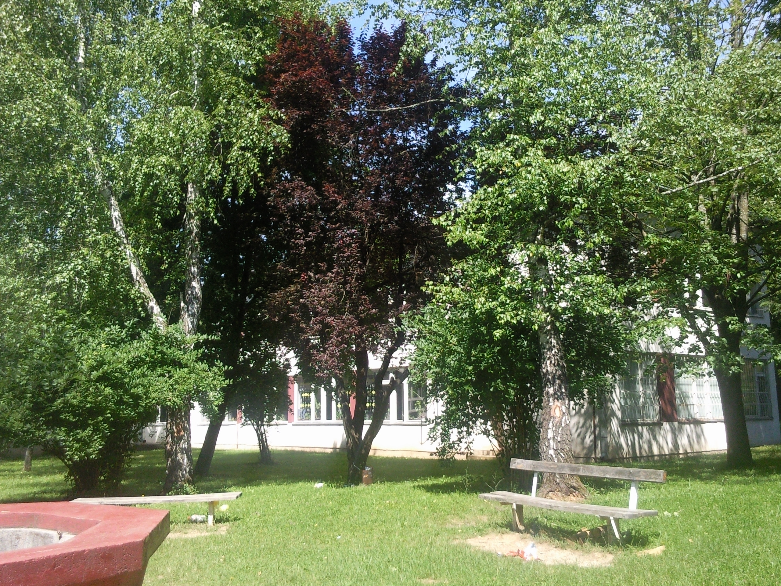 Skola "Miroslav Antic" Bistrica